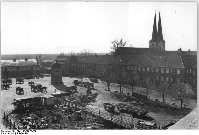 VEG Hadmersleben, Blick in den Hof Illus Biscan 4.3.51 Das beste Saatgut für die Frühjahrsbestellung. Der ertragreichste Sommerweizen der DDR. Das volkseigene Saatzuchthauptgut Kloster-Hadmersleben bei Oschersleben züchtet Saatgut für unsere Landwirtschaft; unter anderem die Weizensorte "Hadmerslebener Peko", den ertragreichsten Sommerweizen der DDR. Die Saatzüchter von Hadmersleben, die bisher nach den alten Methoden arbeiteten, sind jetzt dabei, sich die Lehren Mitschurins und Lyssenkos anzueignen, um mit ihrer Hilfe neue, noch ertragreichere und wertvollere Pflanzen zu züchten. U.Bz.: Das Volksgut Hadmerslleben, Übersicht Leihweise Illus Berlin W8.